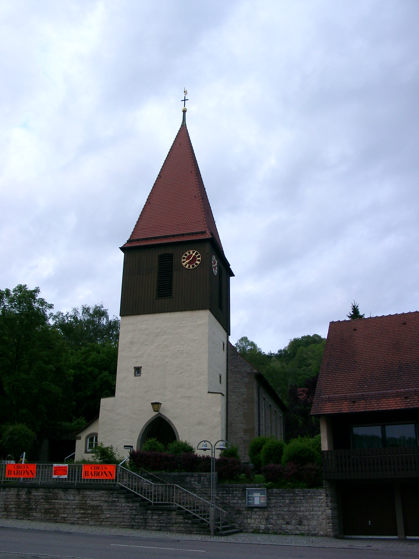 Schwäbisch Hall, Stadtteil Gelbingen, Pfarrkirche